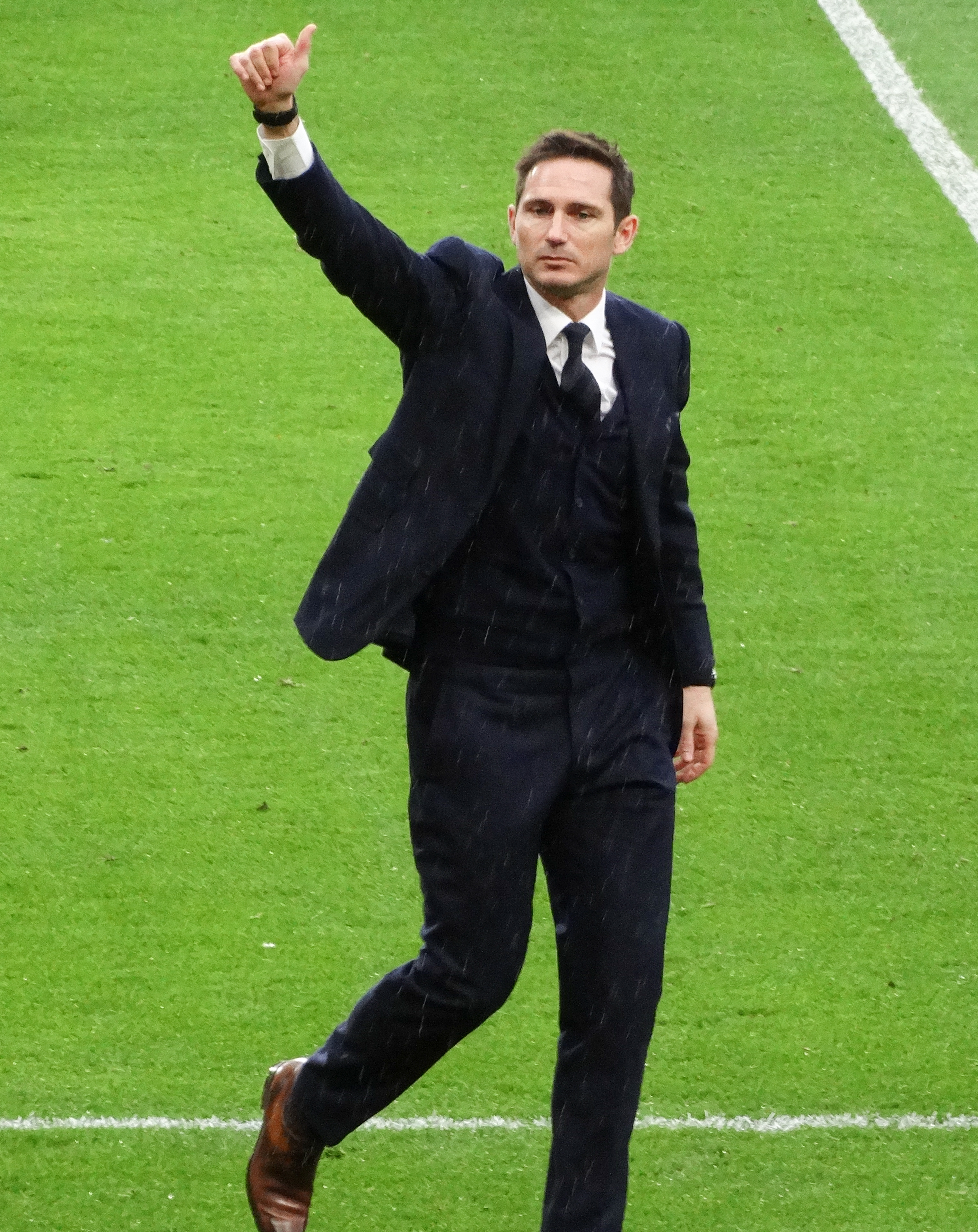 Chelsea 3:1 Swansea